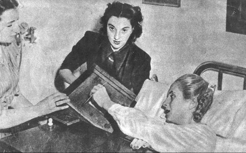 Eva Duarte de Perón (Evita). Votando en el Hospital de Avellaneda 1951